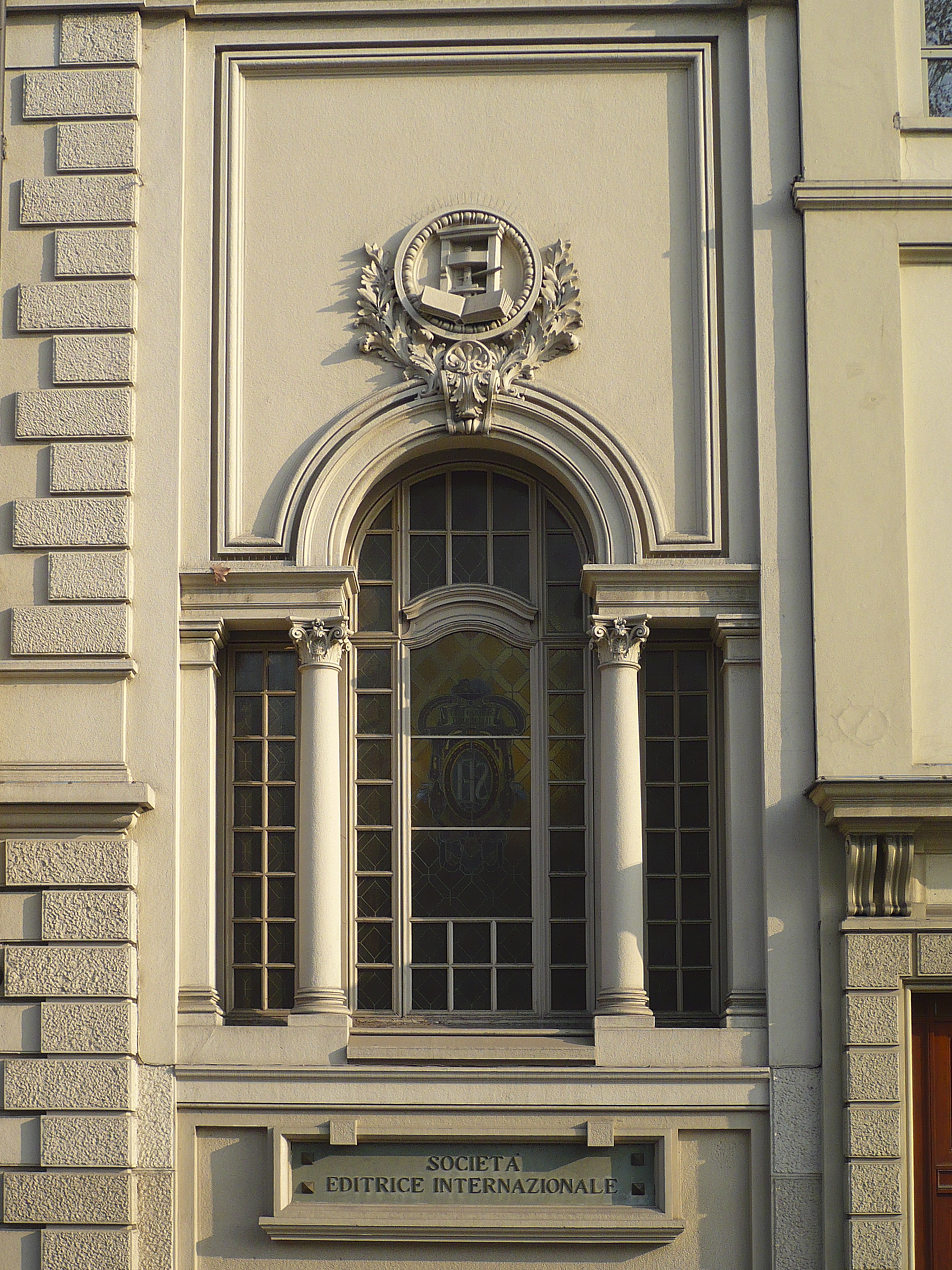 SEI (Società Editrice Internazionale), particolare della facciata della sede in corso Regina, a Torino